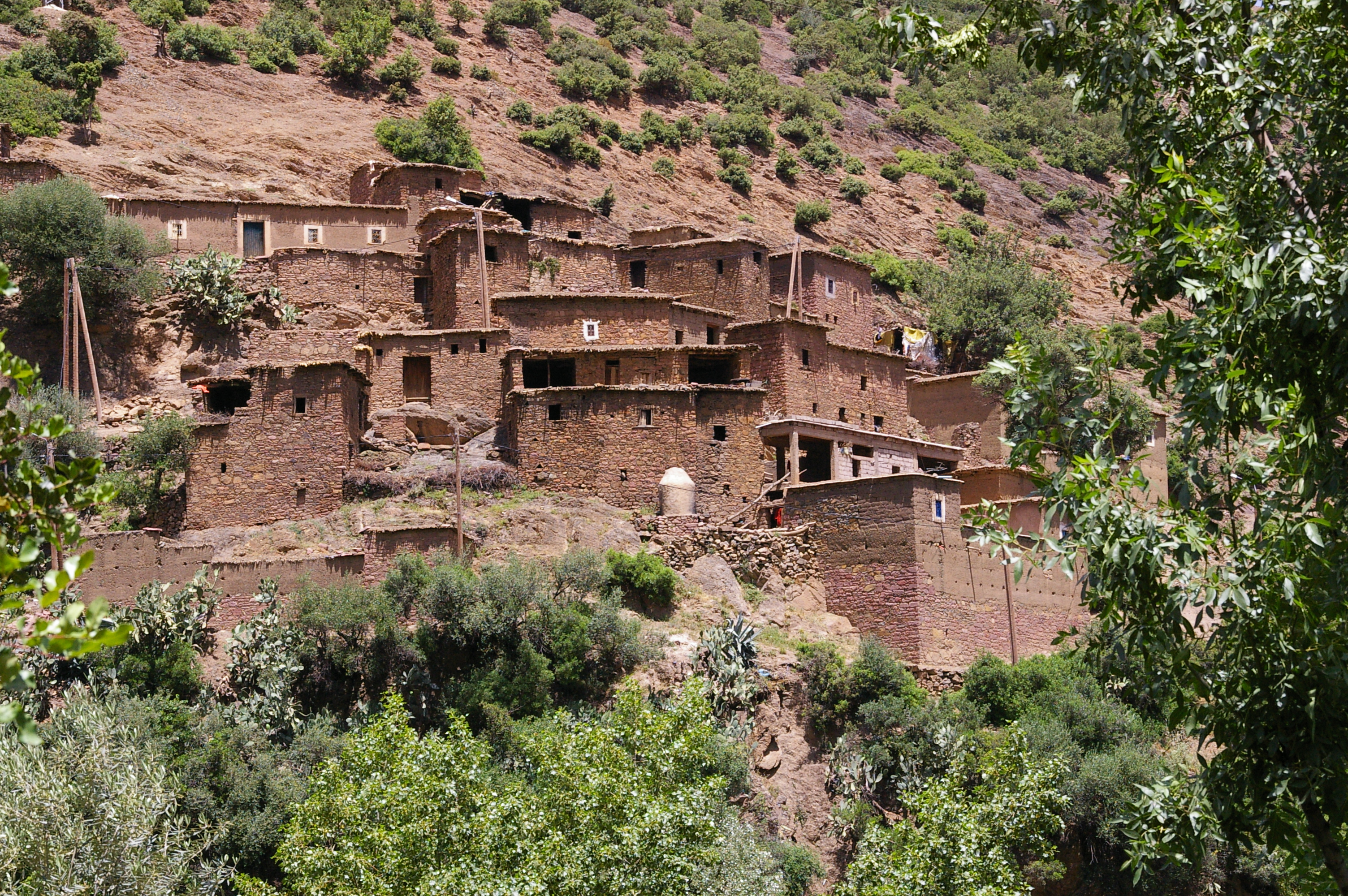 Ourika berbere village